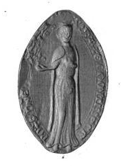 Isabelle († 1248) comtesse de Chartres et de Romorantin